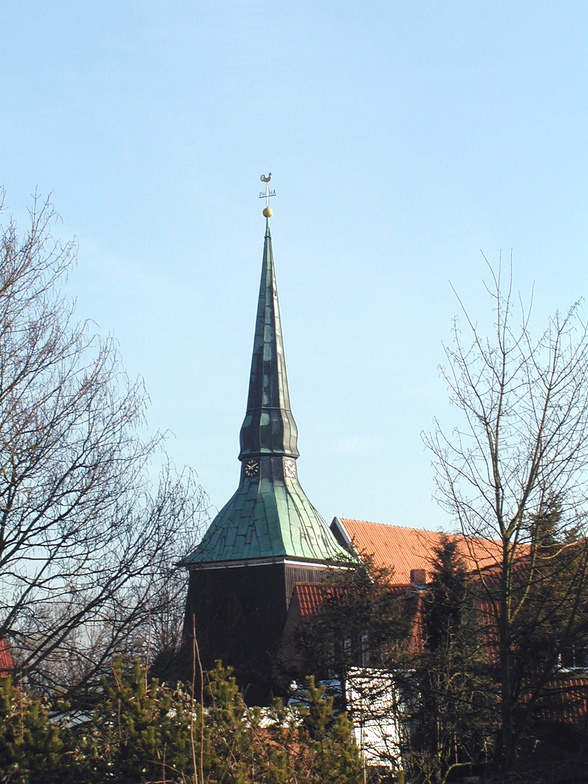 Ein anderer Blick zur Kirche von Osterbruch